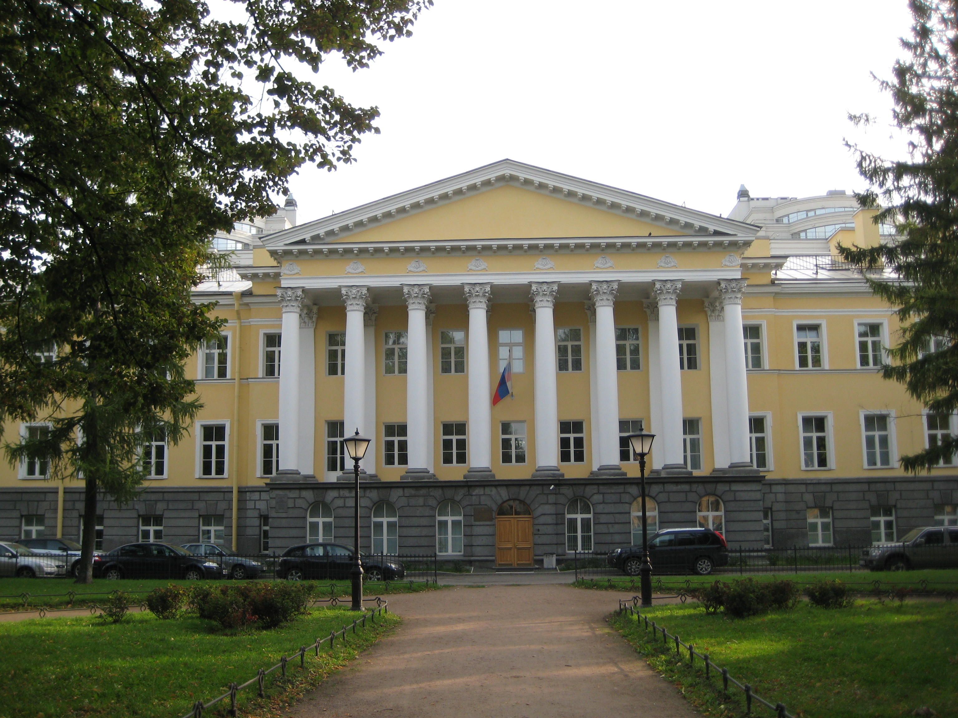 1. Санкт-Петербург. Казармы Преображенского полка. Главное здание. Кирочная ул. 35а